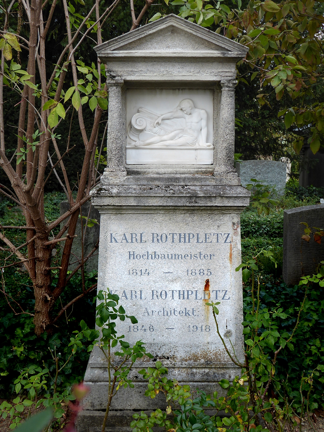 Karl Rothpletz (1814–1885) Hochbaumeister, Architekt. Grab auf dem Friedhof Wolfgottesacker, Basel